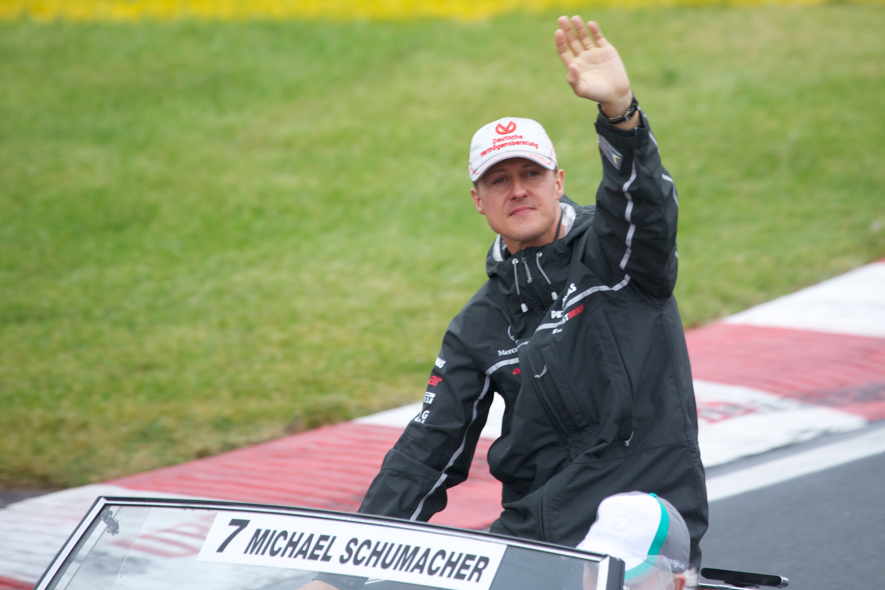 Michael Schumacher dalam parade pembalap jelang GP Kanada 2011